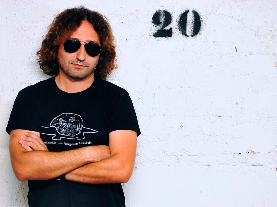 Nando López, compositor, cantante y guitarra / Songwriter, singer and guitar.